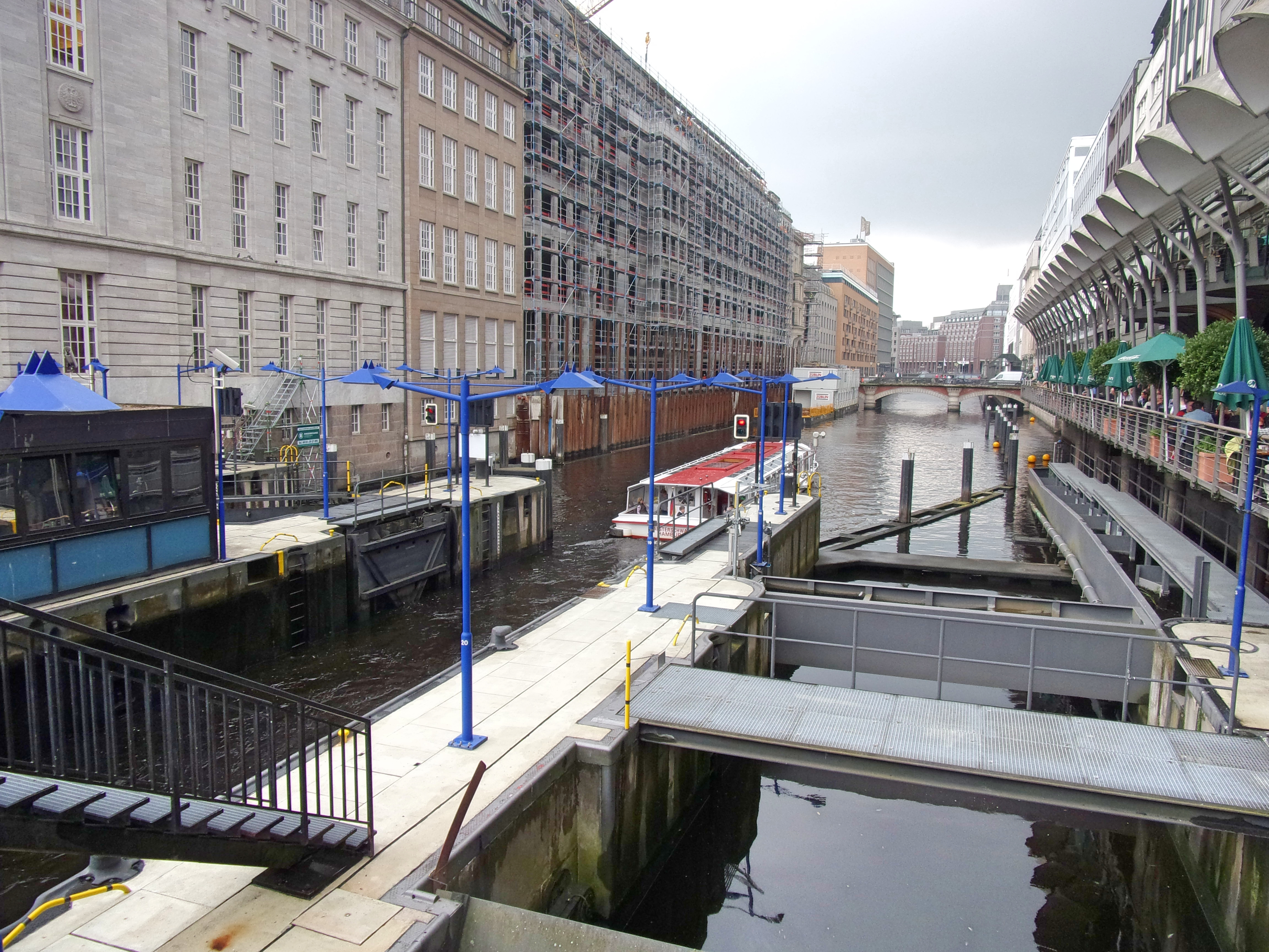 Der Alsterdampfer ist geschleust, die Ampel zeigt bereits wieder rot. This is a photograph of an architectural monument.